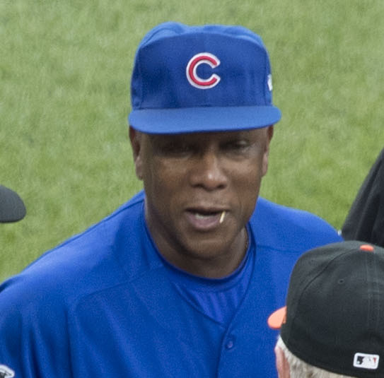 Cubs at Orioles 7/14/17